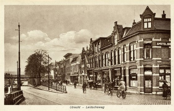 Van Sijpesteijnkade te Utrecht tussen 1918 en 1928. Tot 1974 heette dit nog de Leidseweg/Leidscheweg.